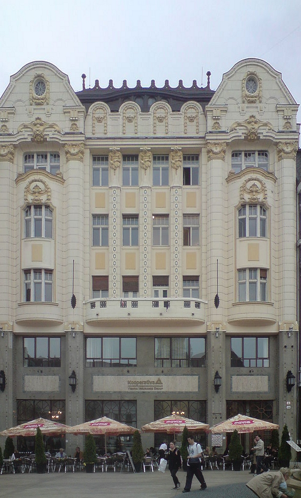 Palác Uhorskej eskontnej a zmenárenskej banky, Hlavné námestie, Bratislava